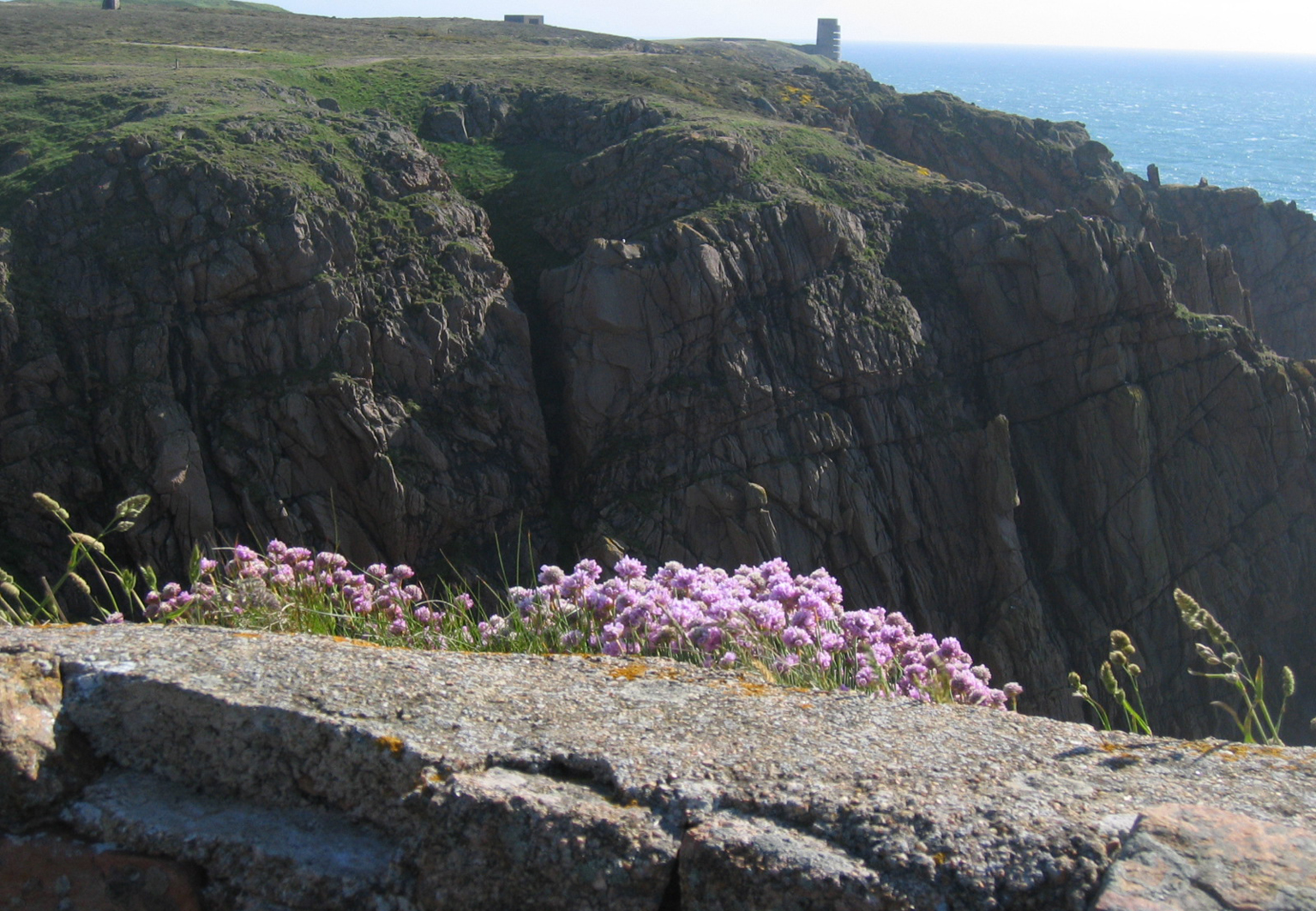 Klippen bei Grosnez, Nordwesten der Insel Jersey, typische Vegetation mit Strand-Grasnelke (Armeria maritima).